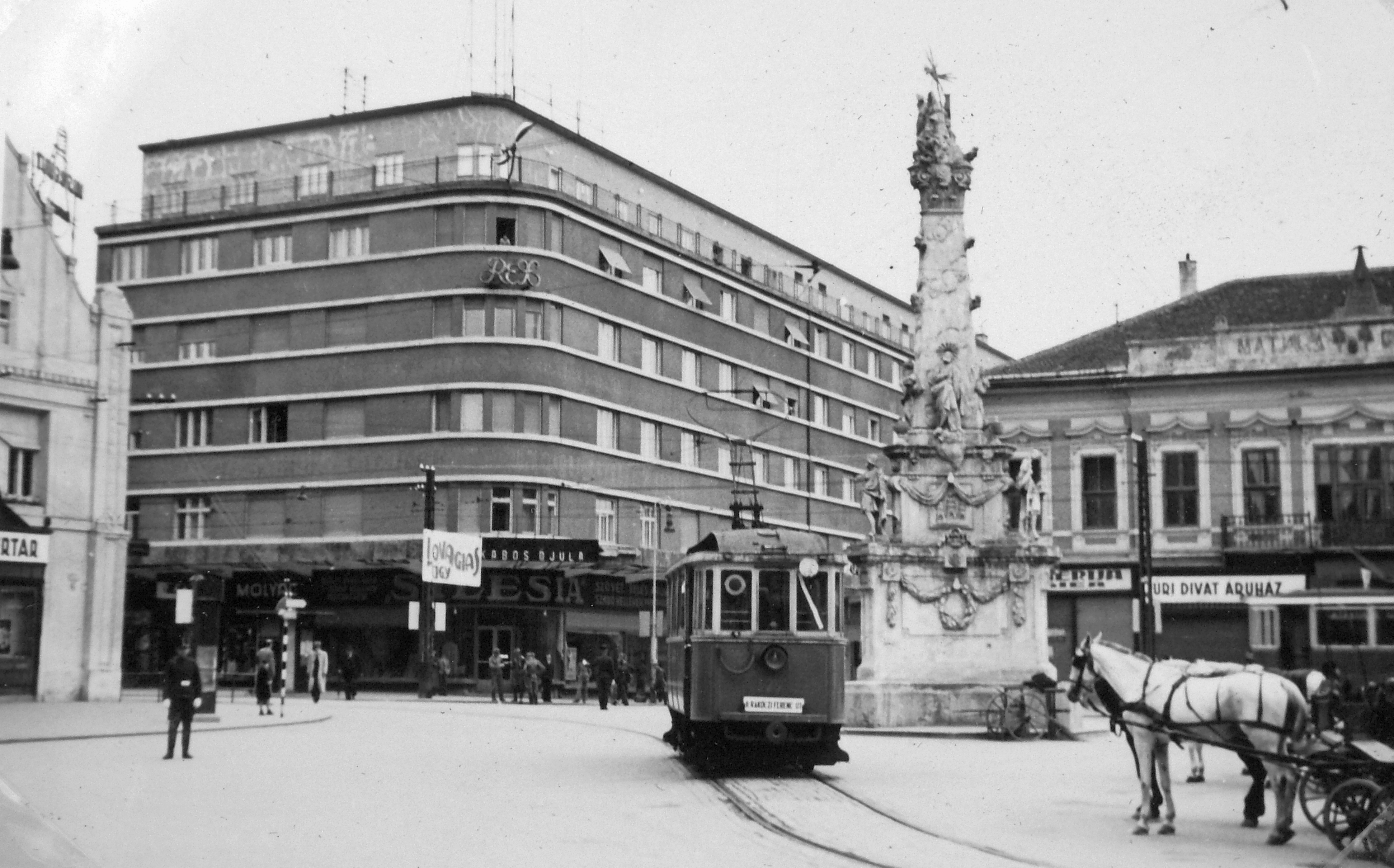 Ferenc József tér. Location: Serbia, Novi Sad Tags: tram Title: Ferenc József tér.